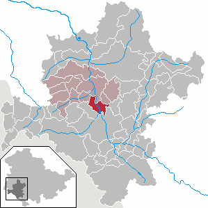 Walldorf in Thuringia - District Schmalkalden-Meiningen